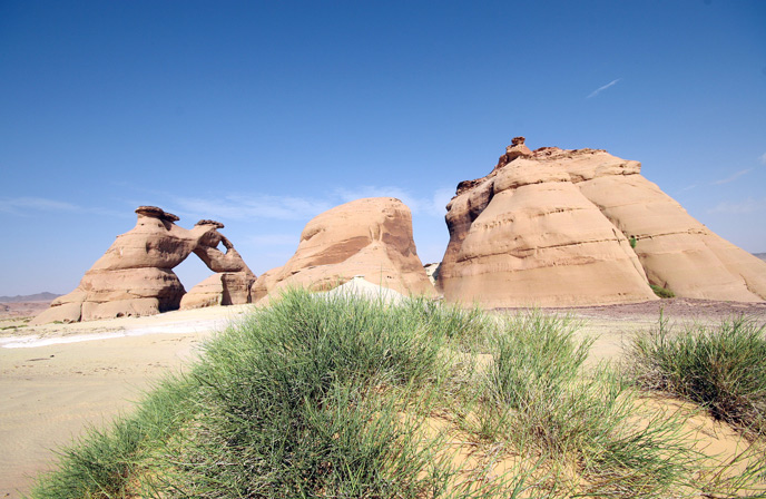 Mahajaj